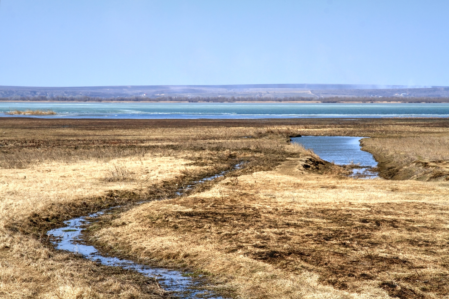 Озера Нижнего Прута (№ 1029 в Рамсарском списке), монумент природы, находится в Район Кахул(код MD-CH-zu-001)